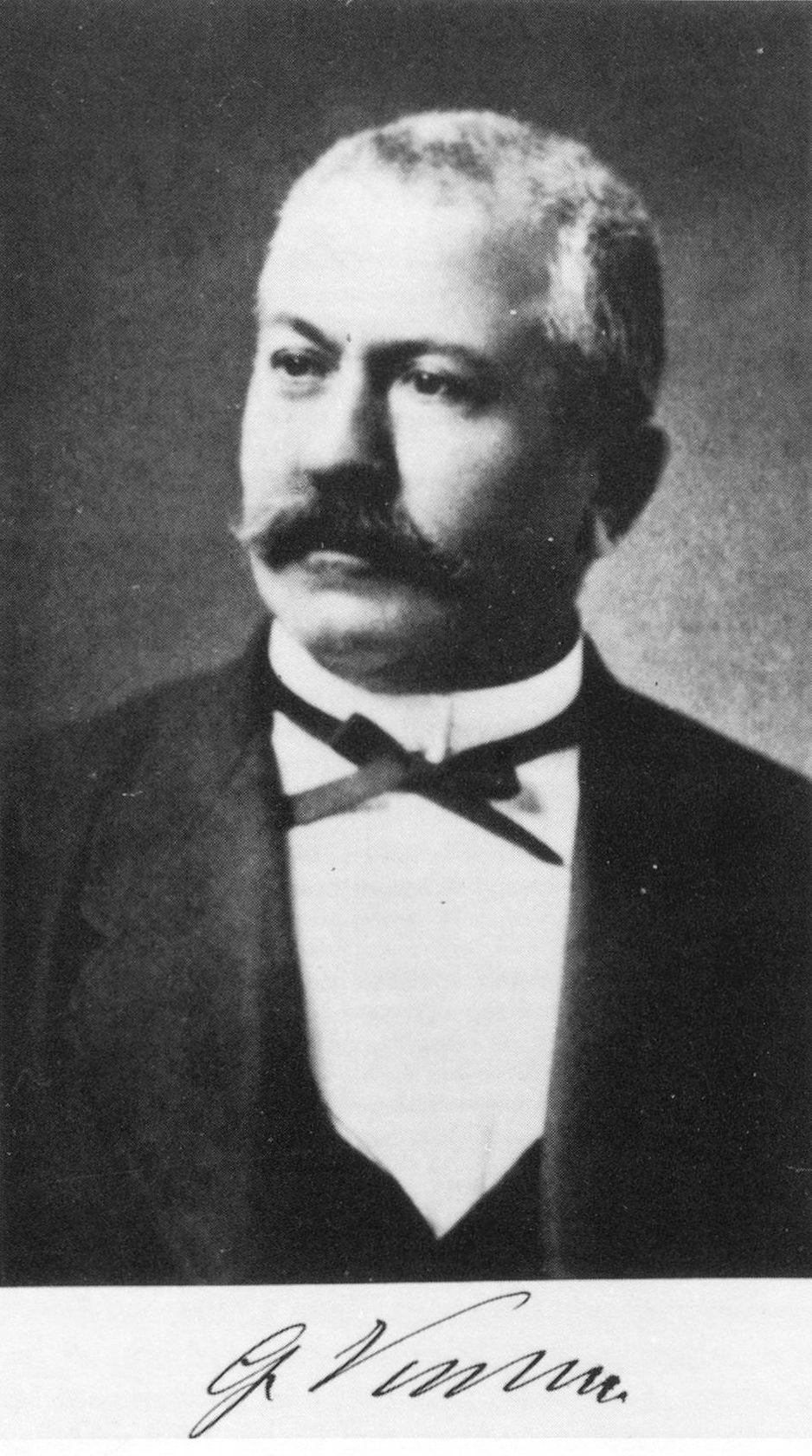 Gotthilf Kuhn mit Signatur, vor 1890.